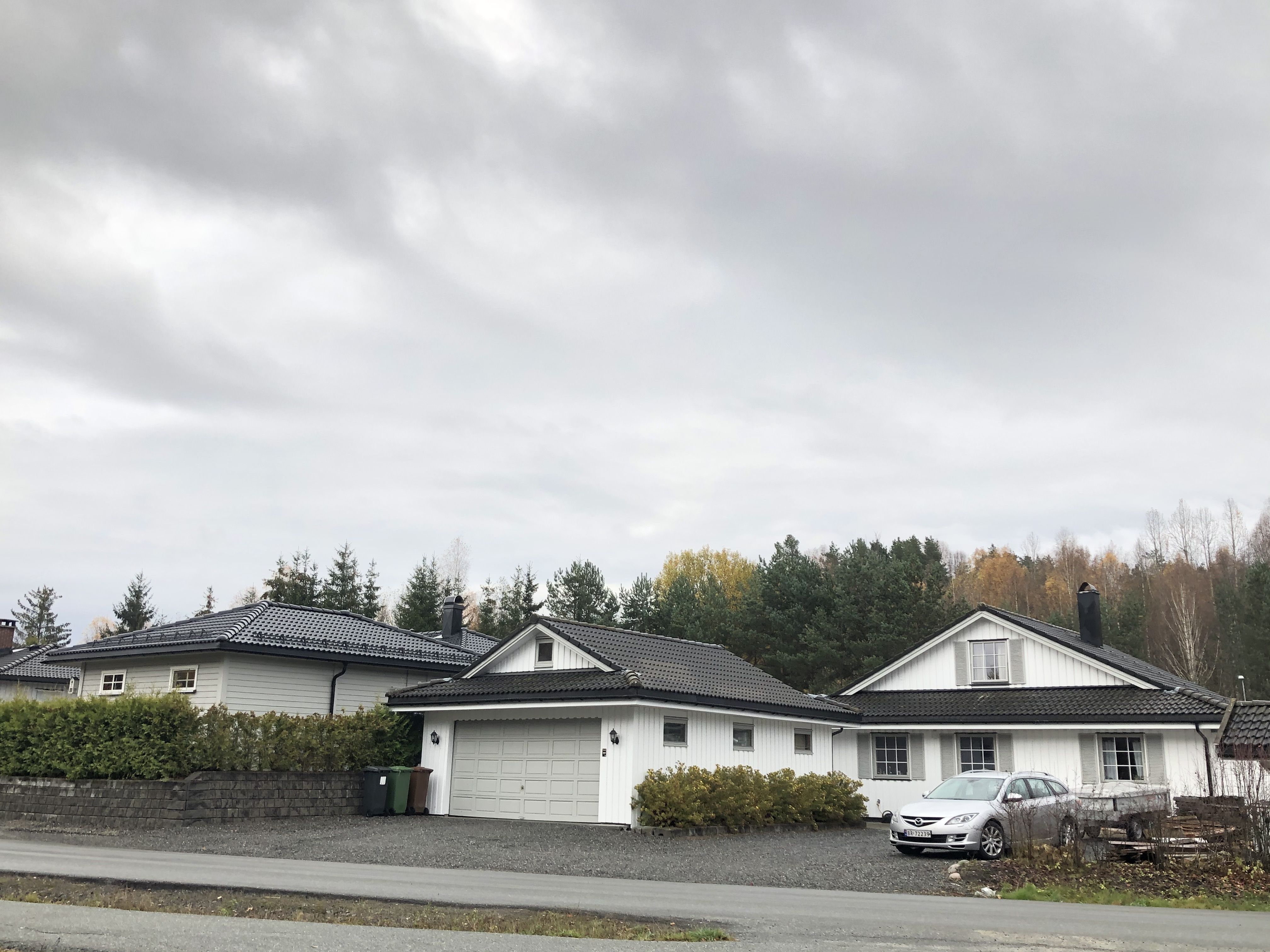 Veienkollen 1, Hønefoss